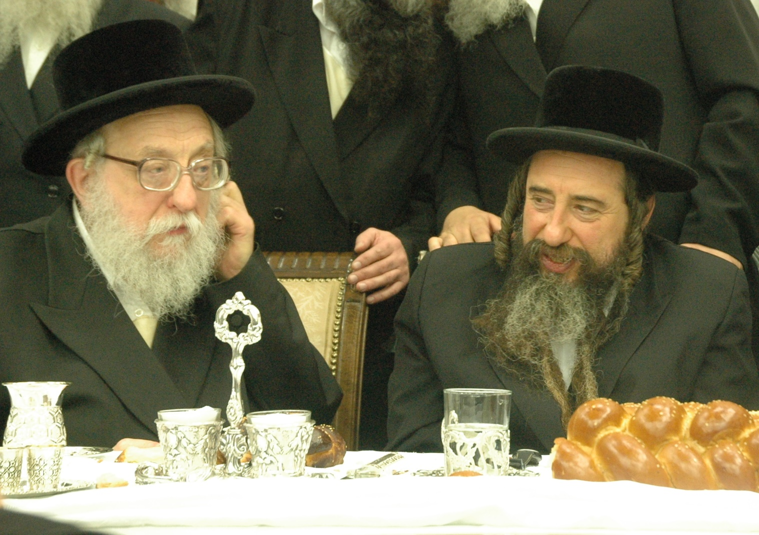 חנוכת הבית רחמסטריוקא בירושלים